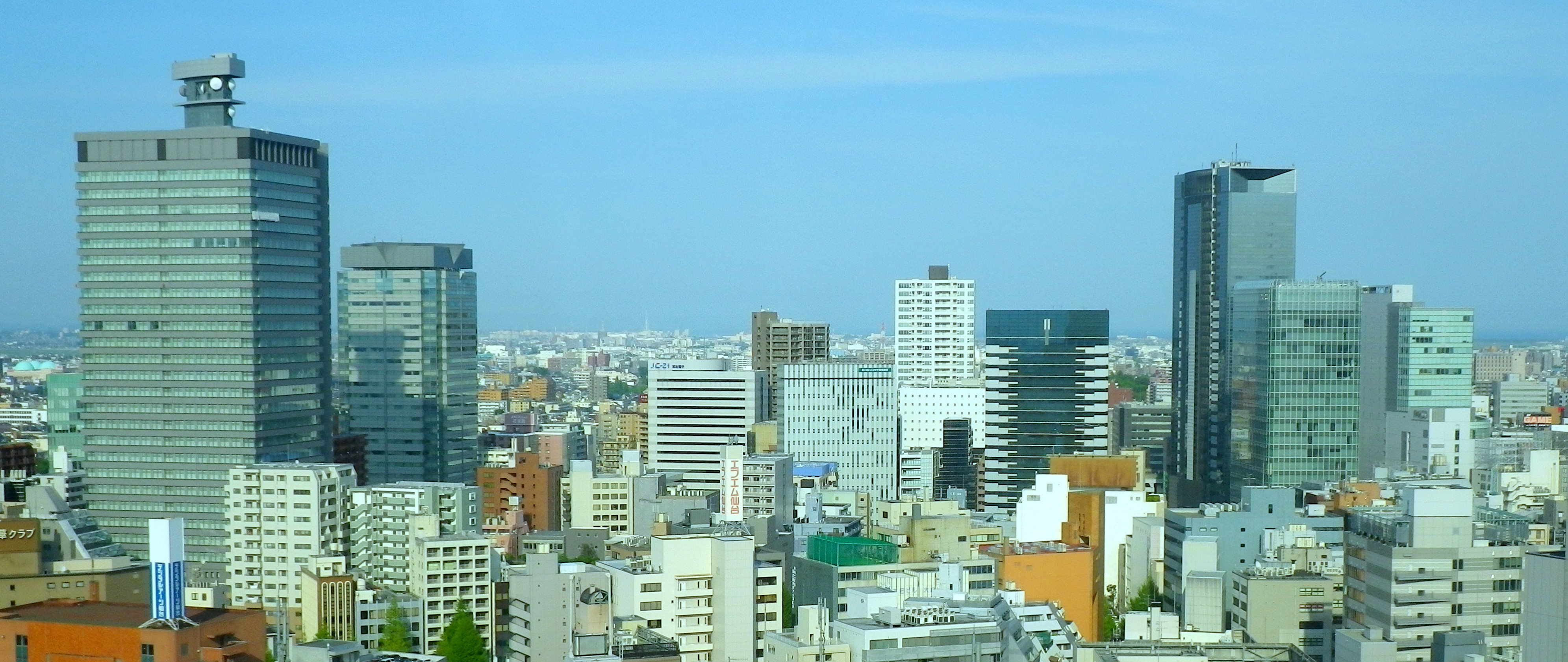 仙台駅の北側にあるビル群